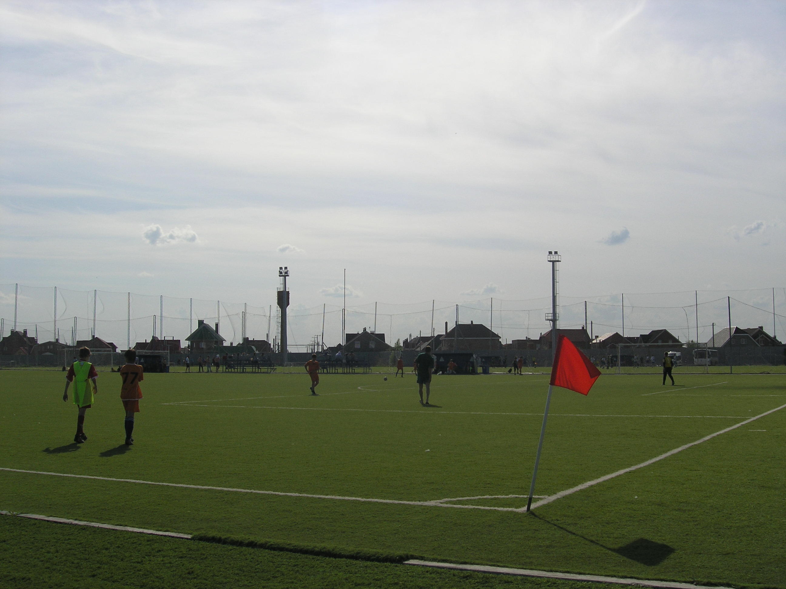 Одно из футбольных полей Академии футбола имени Юрия Коноплёва. Приморский. Ставропольский район Самарской области.